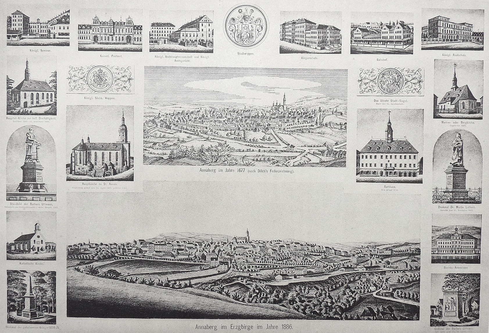 Annaberg (Annaberg-Buchholz), Lichtdruck, Souvenirblatt mit 21 Ansichten: Königl. Seminar. Kaiserl. Postamt. Königl. Amtshauptmannschaft und Königl. Amtsgericht. Stadtwappen. Bürgerschule. Bahnhof. Königl. Realschule. Hospital-Kirche zur heil. Dreifaltigkeit. Königl. Sächs. Wappen. Das älteste Stadt-Siegel. Marien- oder Bergkirche. Standtbild der Barbara Uttmann. Hauptkirche zu St. Annen. Annaberg im Jahre 1677 (nach Dilich's Federzeichnung). Rathaus. Denkmal Dr. Martin Luther. Katholische Kirche. Denkmal der gefallenen Krieger 1870-71. Annaberg im Erzgebirge im Jahre 1886. Bezirks-Armenhaus. Grabmal der Barbara Uttmann. Darstellung: 22,7 × 31,7 cm, Blatt: 28,6 × 36,9 cm